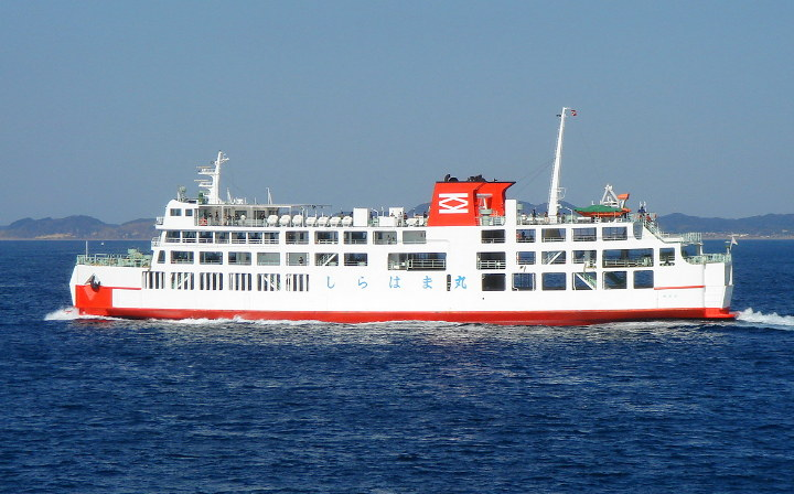 Shirahama maru of Tokyowan Ferry. IMO 8909161